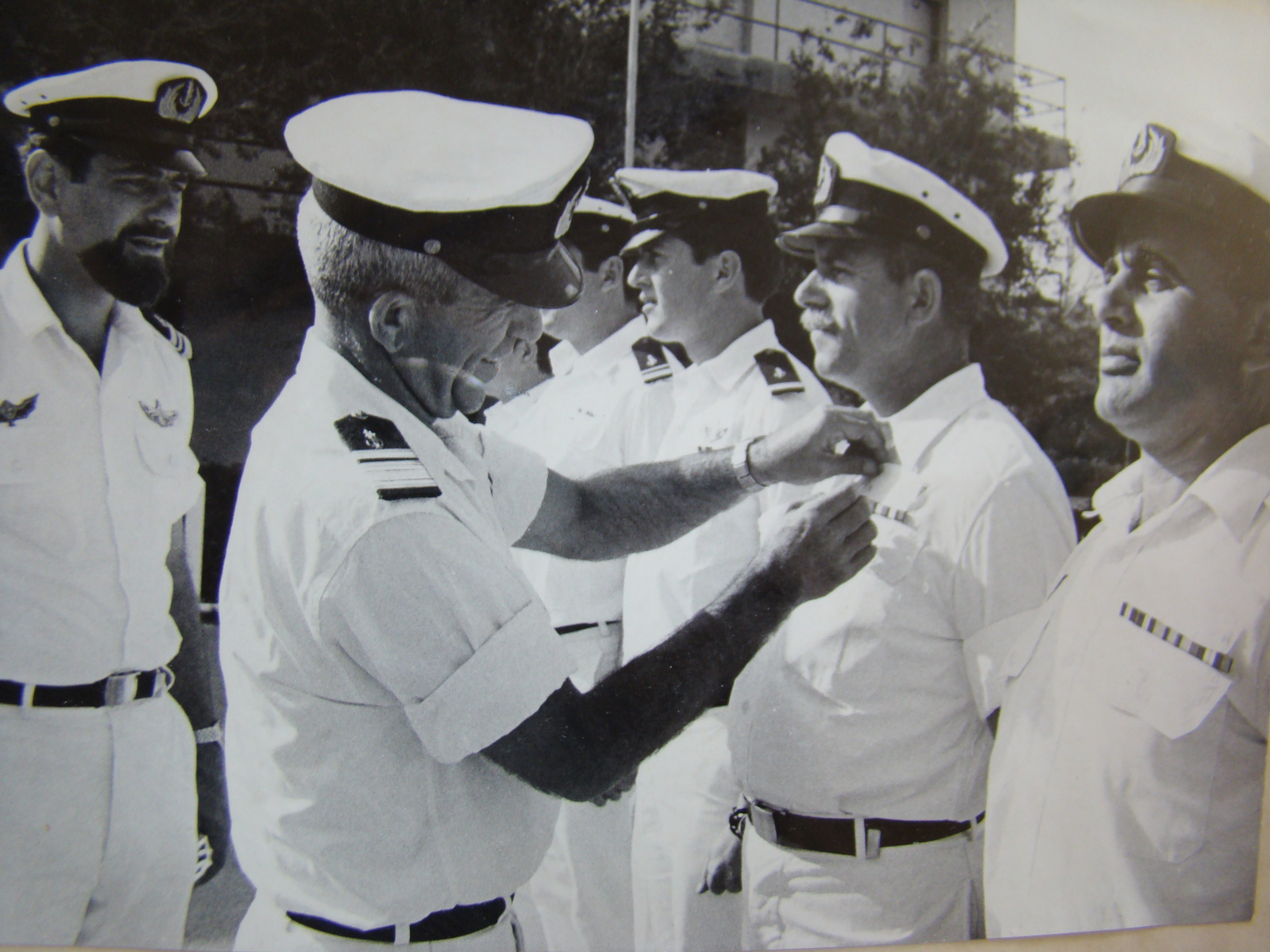 מפקד חיל הים אברהם בוצר מעניק את כנפי העטלף לסגל יחידה 707 אפריל 1969.